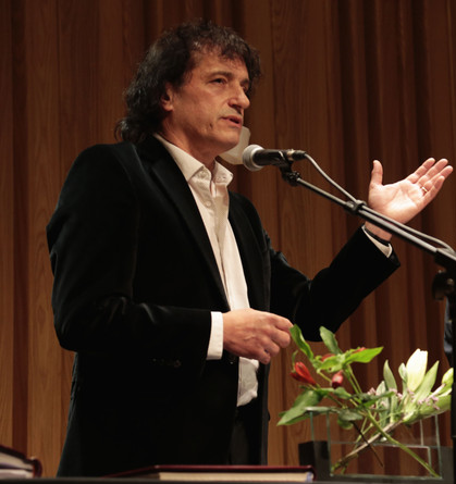 Horacio Rodríguez Larreta, jefe de gobierno porteño junto a Ángel Mahler, durante su jura como Ministro de Cultura de la Ciudad